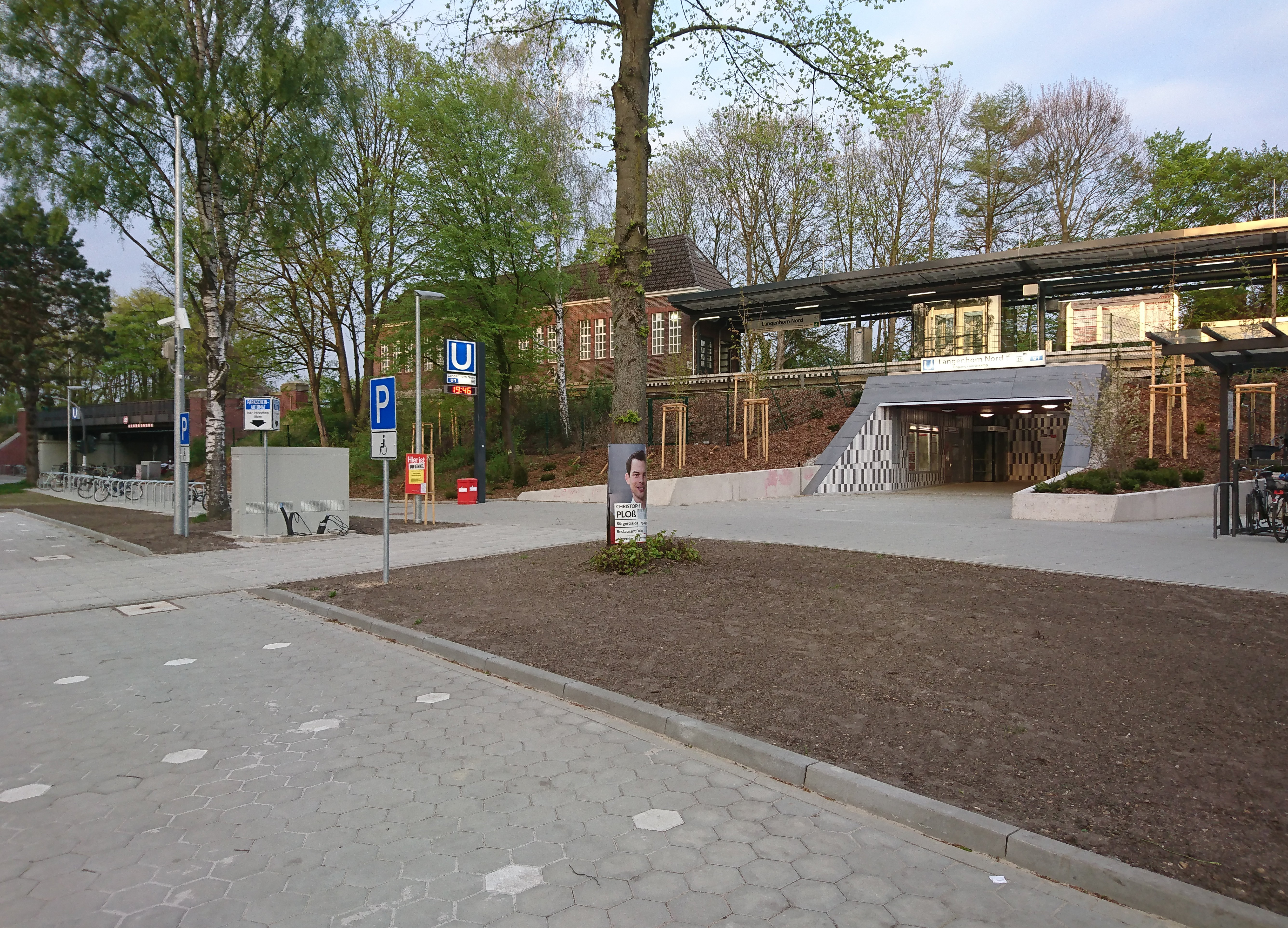 U-Bahnhof Langenhorn-Nord, Seiteneingang.